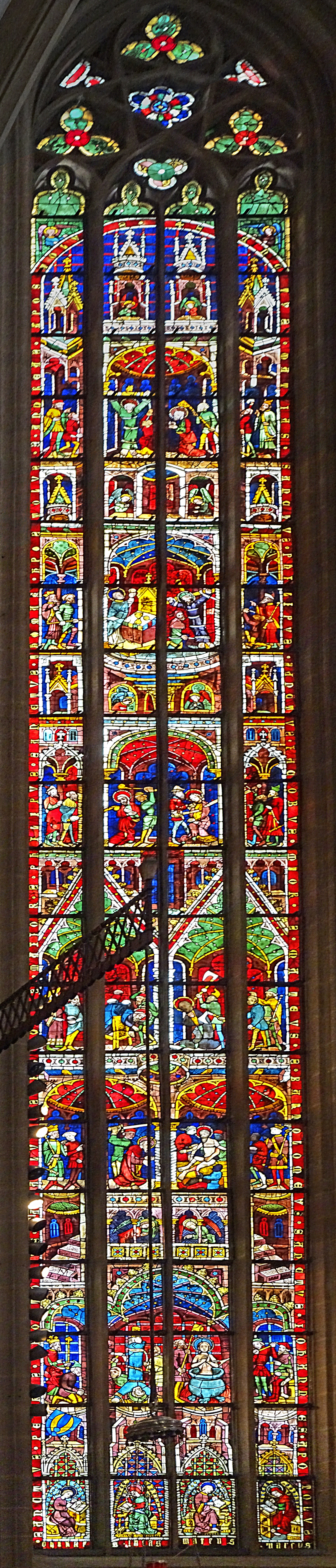 Apostelmartyrienfenster (nIV) im Hohen Chor des Erfurter Doms St. Marien